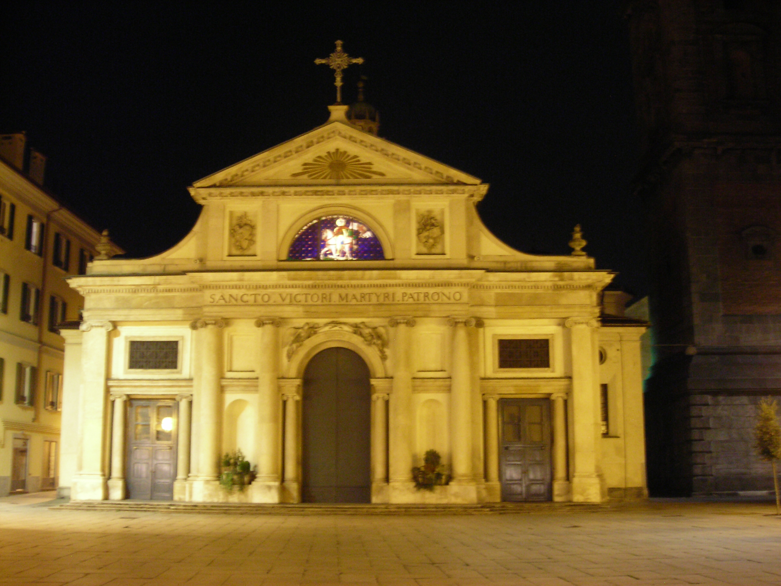 Basilica di san Vittore martire a varese, vista di notte.